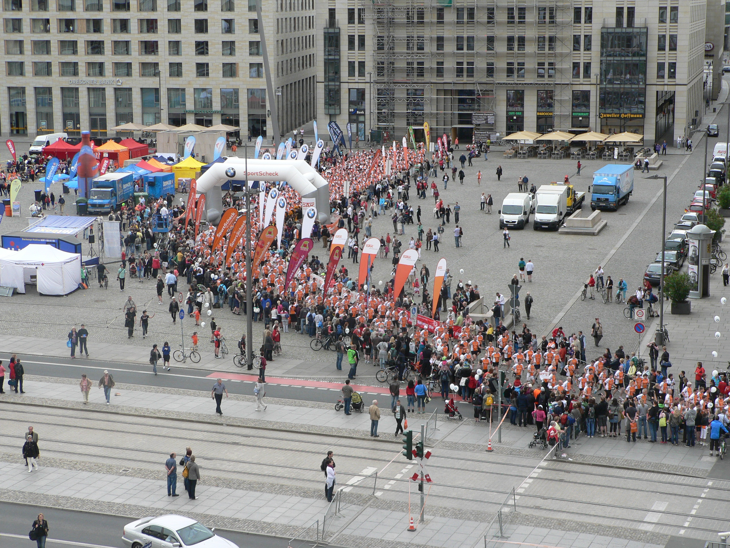 Dresden Citylauf